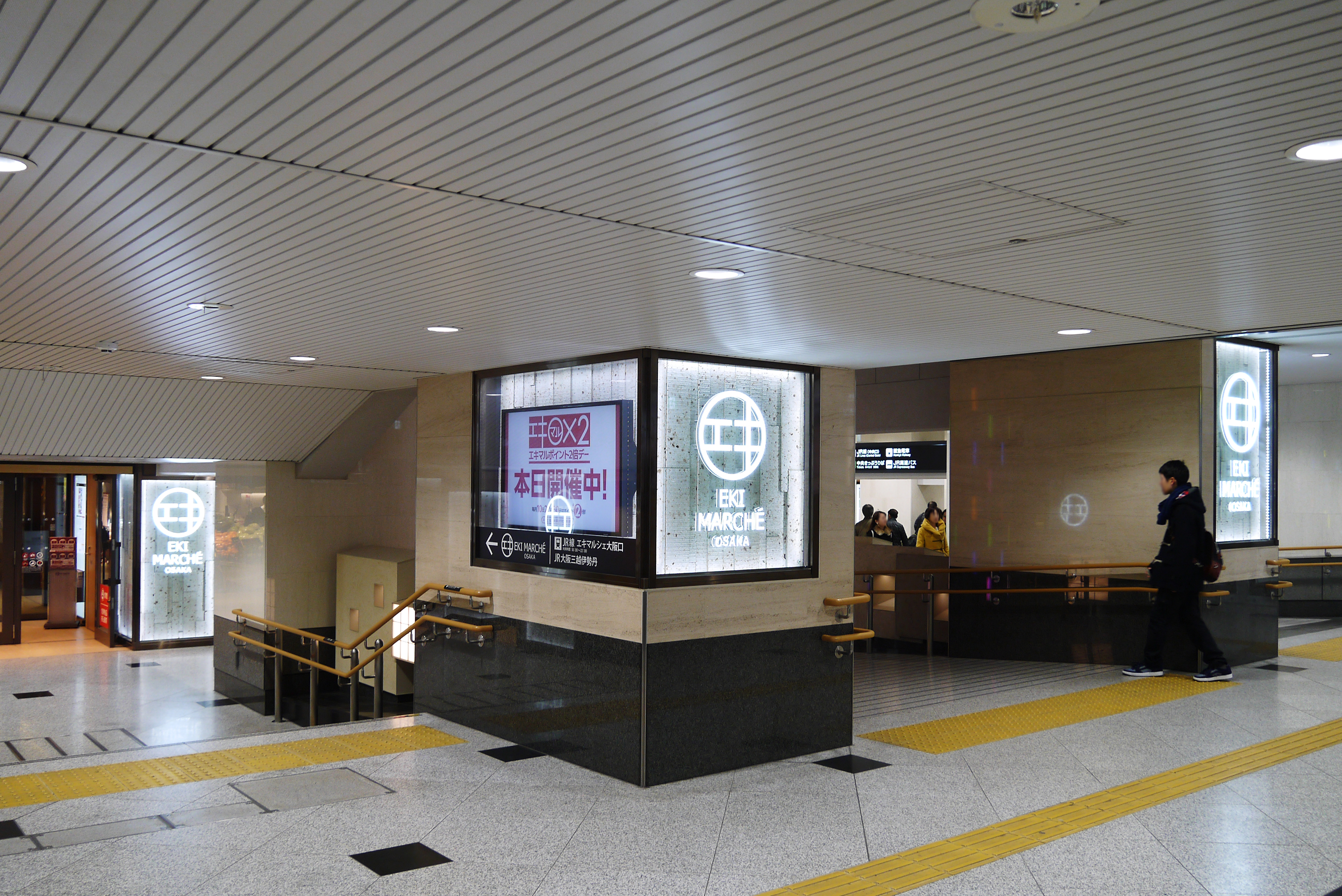 EKI MARCHE (エキマルシェ), Osaka Station, Osaka, Osaka prefecture, Japan